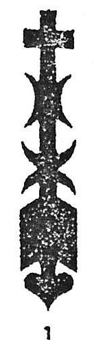 Afbeelding van Twents gevelteken nr. 1